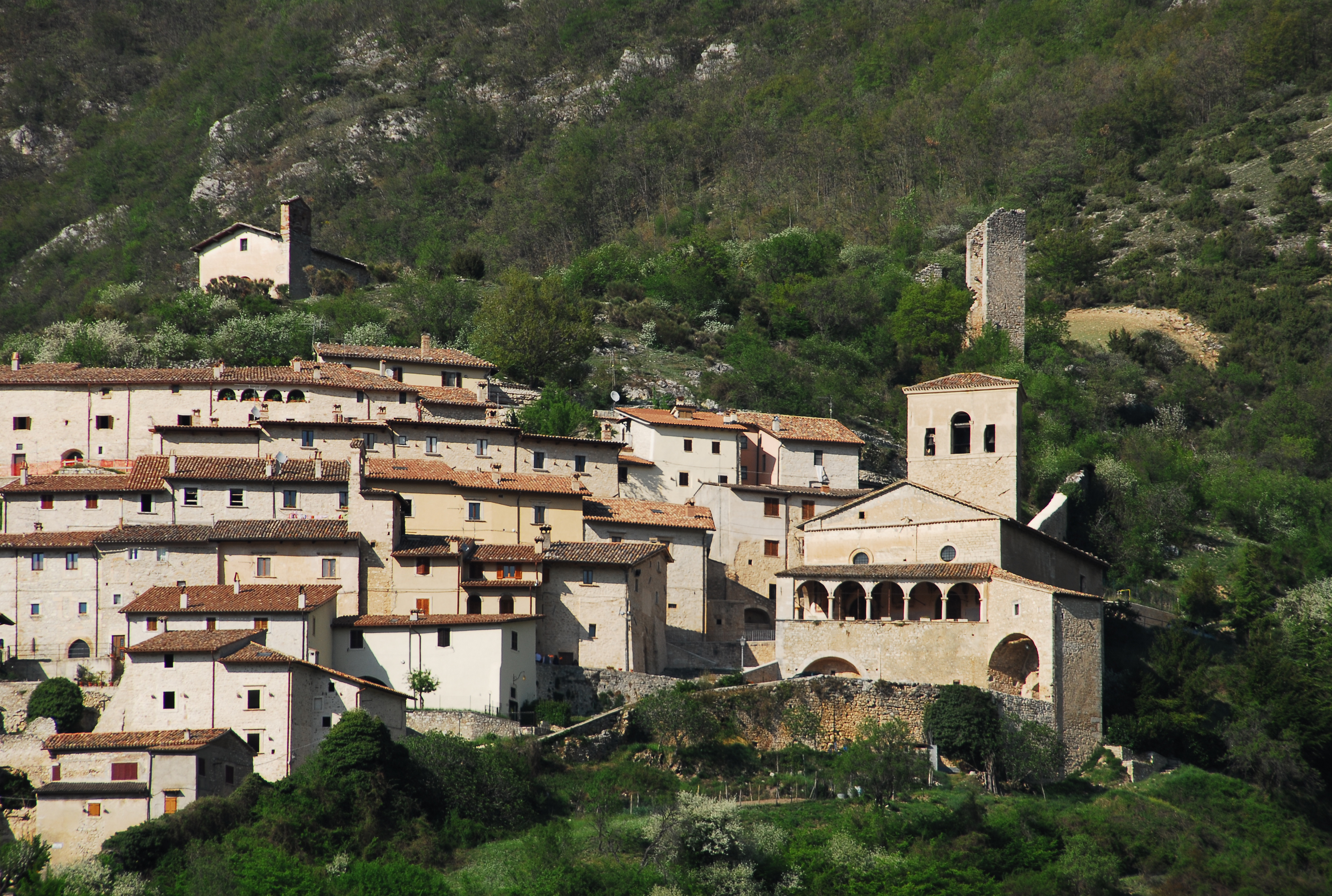 Chiesa di Sant’Andrea - Campi